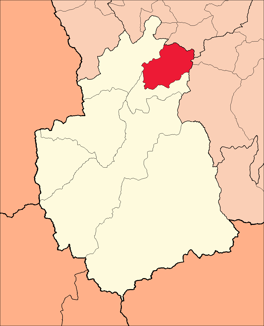 Área del distrito de San Francisco de Asís dentro de la provincia de Lauricocha.